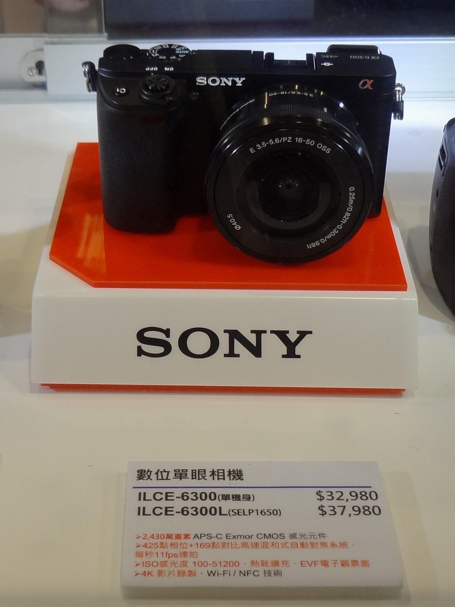 2016年台北資訊月，索尼數位單眼相機ILCE-6300L。